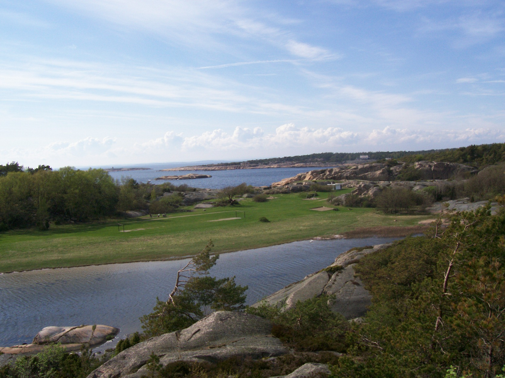 Grøntområde, strand (indre bukt) Mærrapanna. Hankø i bakgrunnen.